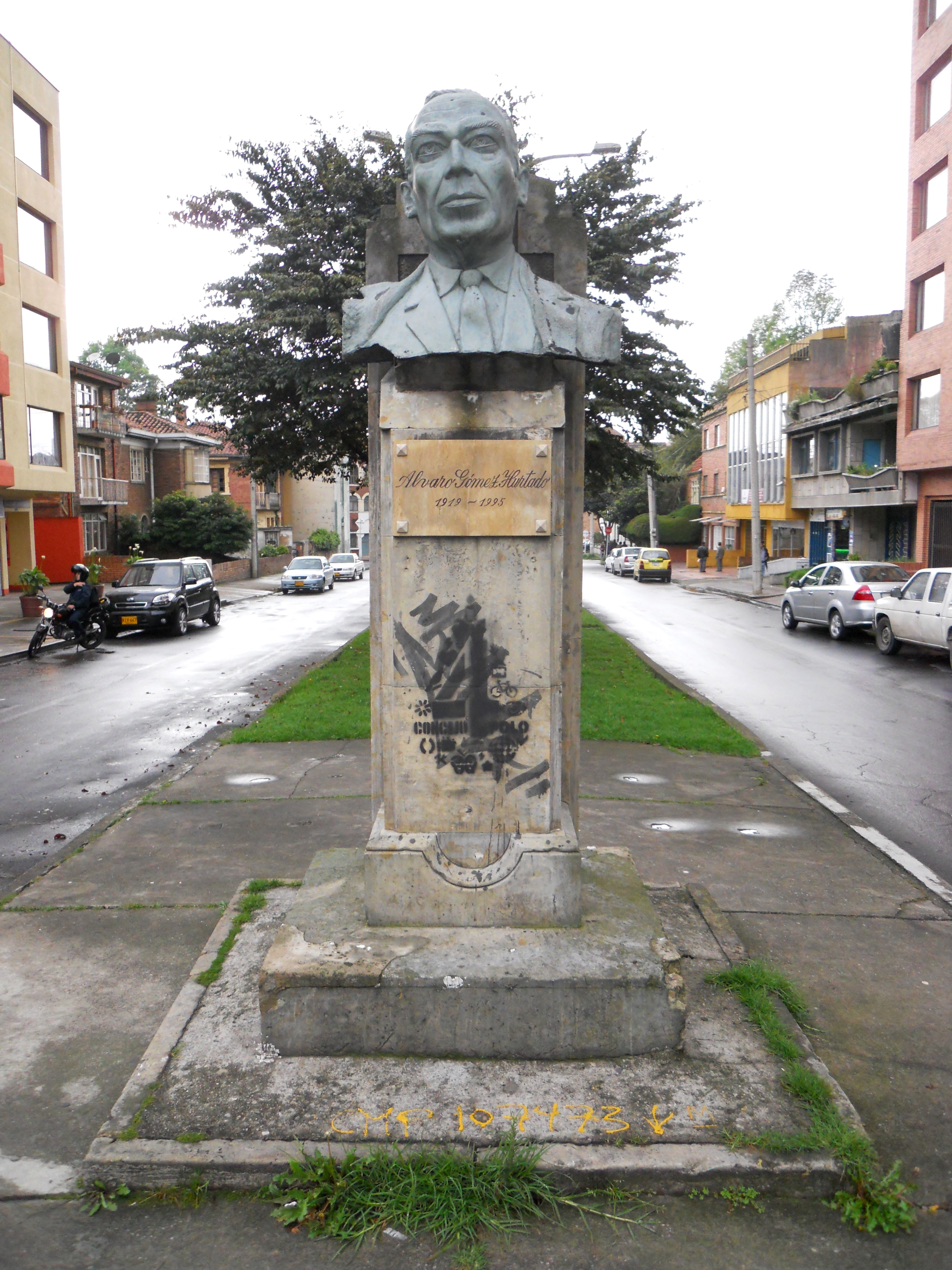 Busto del político colombiano Álvaro Gómez Hurtado, en el barrio Teusaquillo de Bogotá.